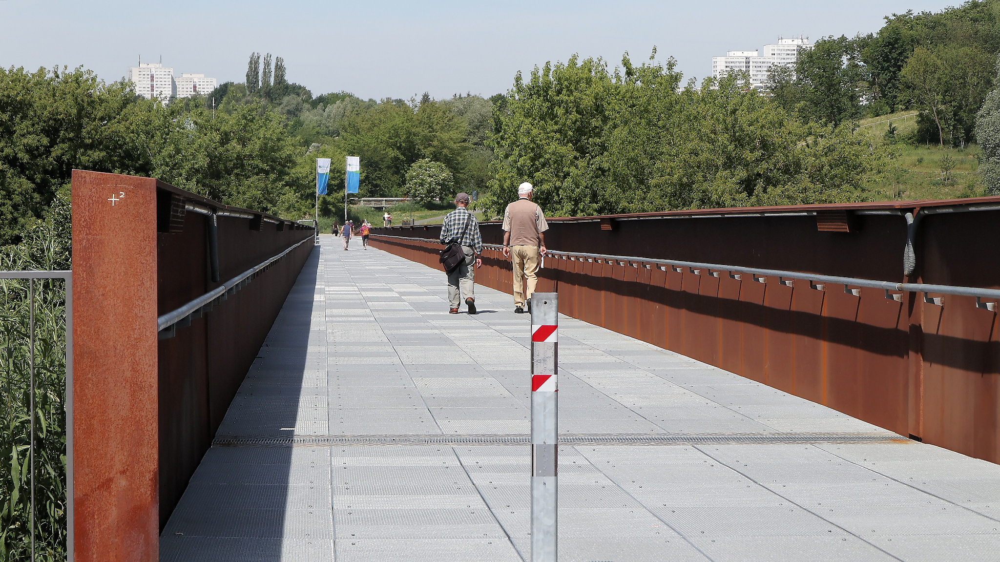 Brücke über den Naturbereich der IGA